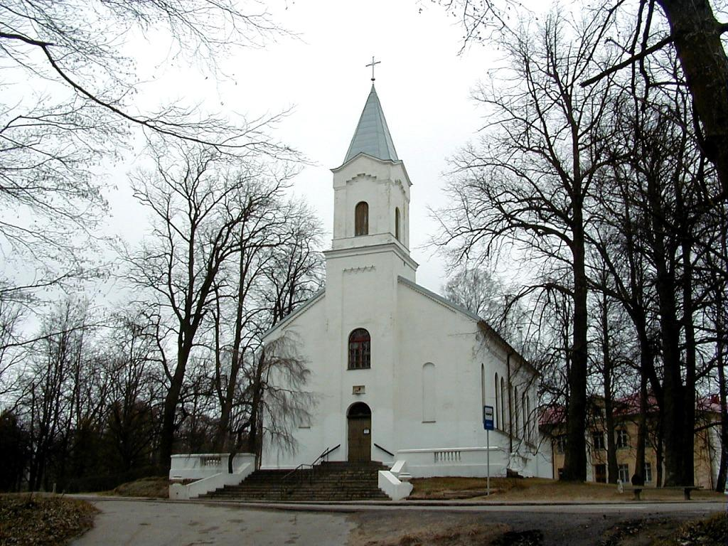 Saulkrastu luterāņu baznīca 2000-04-09